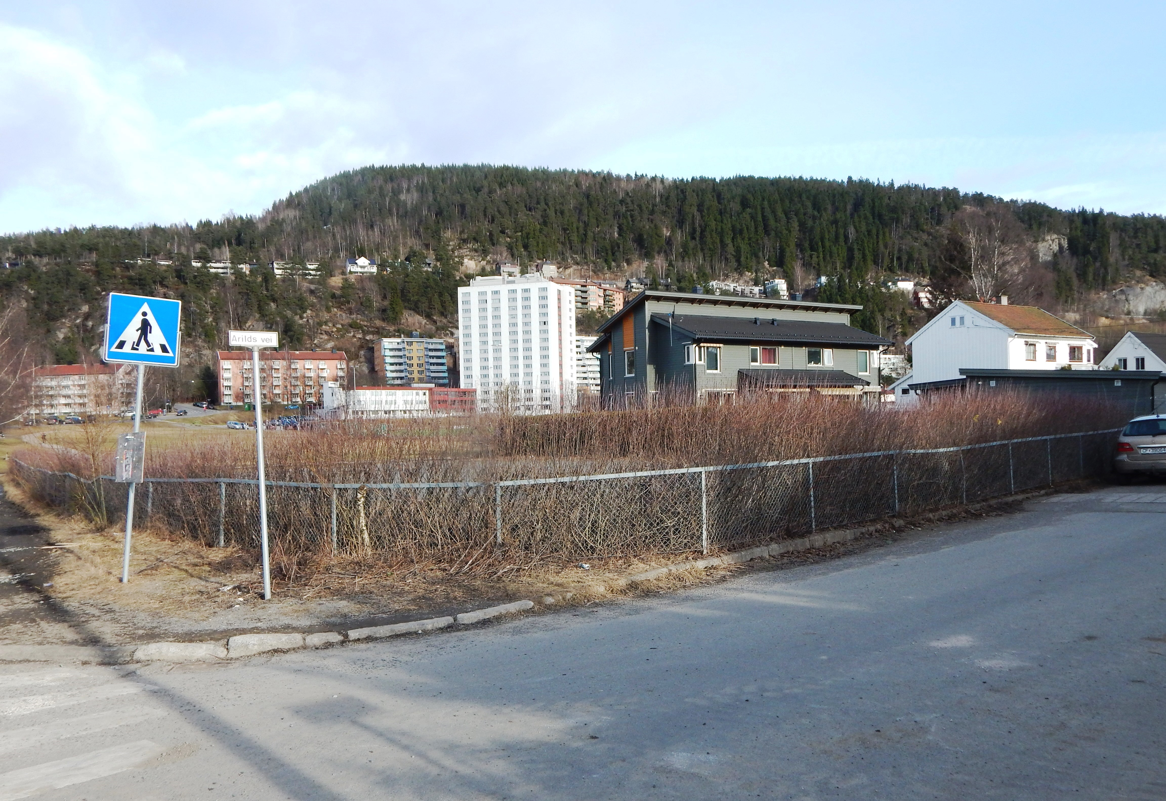 Arild vei på Grefsenplatået i Oslo